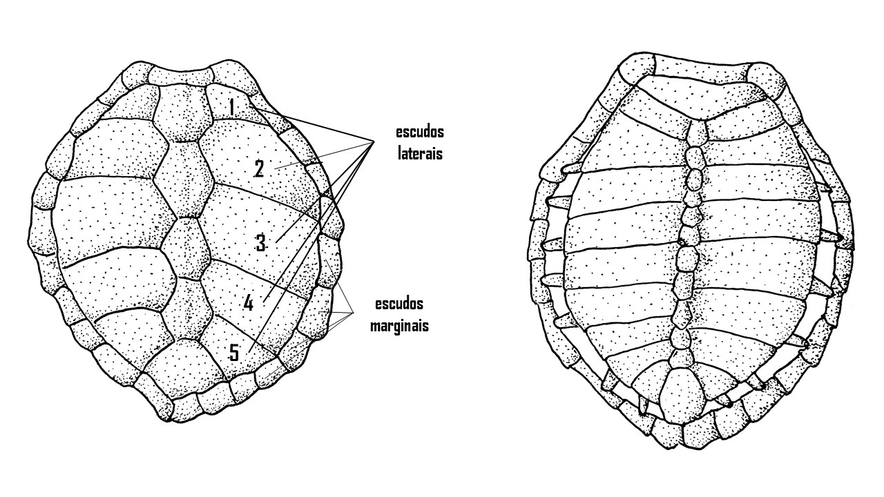 Localização dos escudos na carapaça de tartarugas marinhas, utilizados para diferenciar espécies